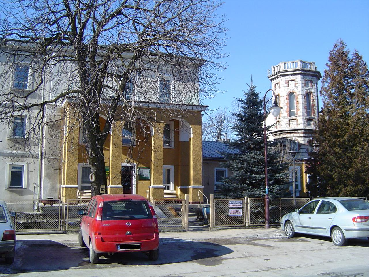 Solec Zdrój - Sanatorium Świt